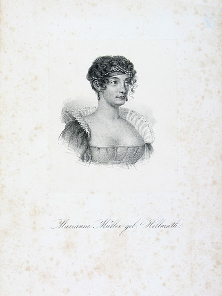 Marianne Müller (1742–1851), deutsche Opernsängerin